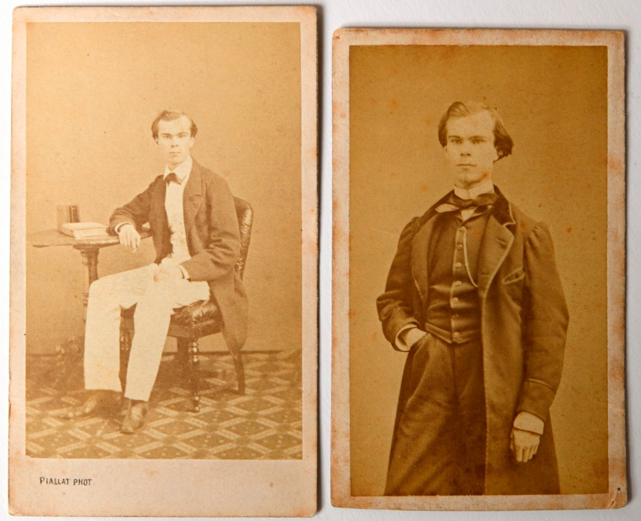 Photographies partie d'un album comprenant des photos de Paul Verlaine (1844-1896) et de certains de ses proches découvert à Lille en octobre 2019.